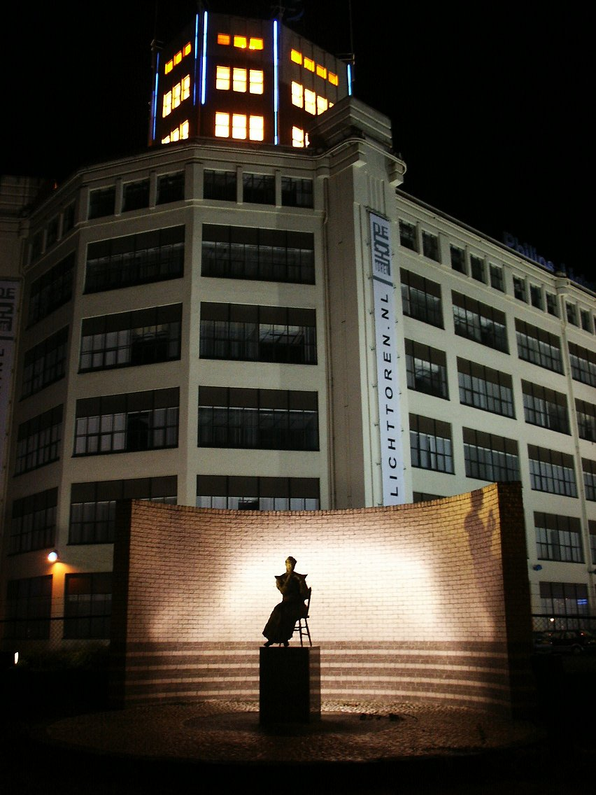 De Lichttoren in Eindhoven, ervoor het Lampenmaakstertje, een kunstwerk van Jos van Riemsdijk uit 1966